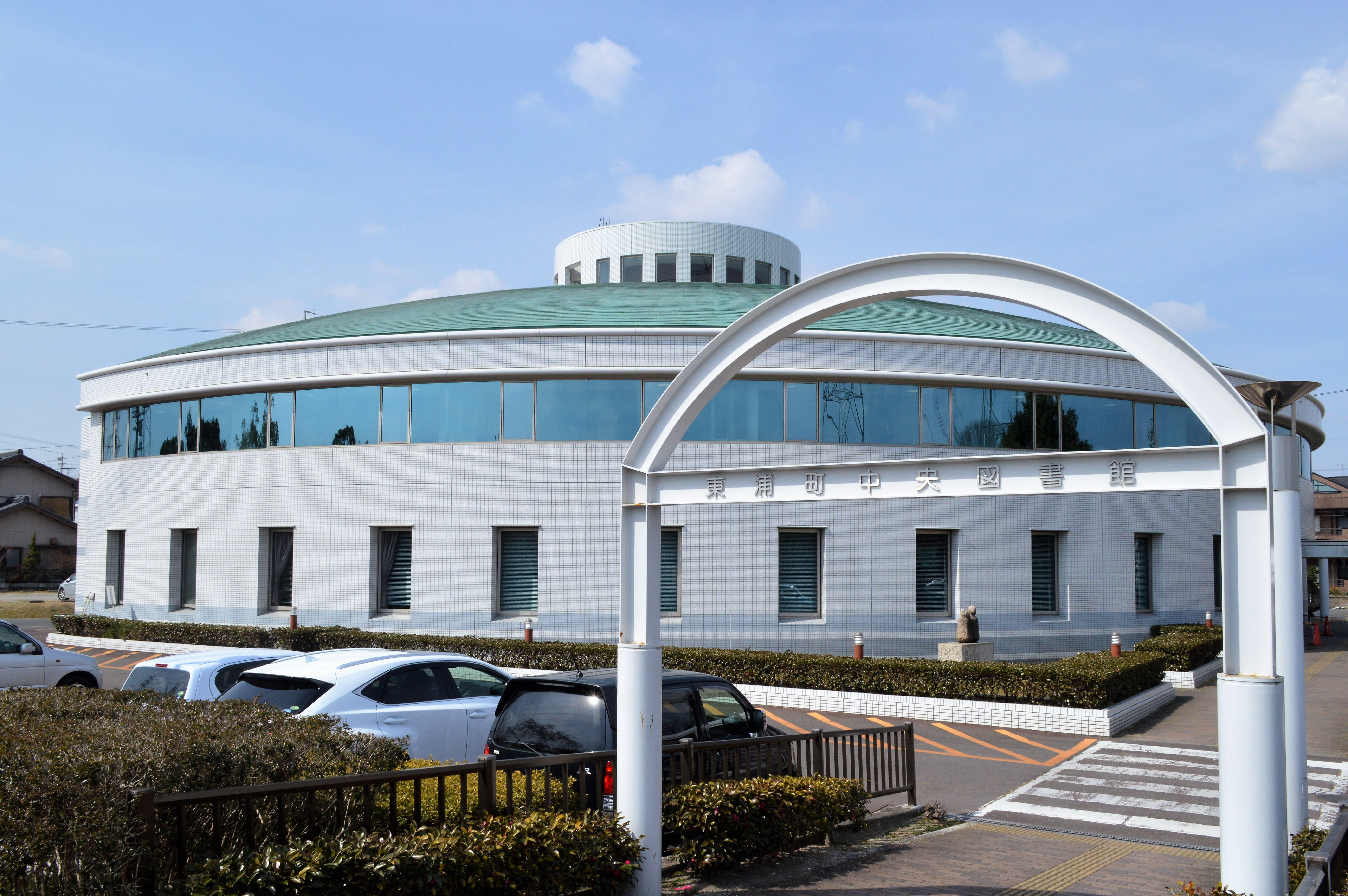 愛知県知多郡東浦町の東浦町中央図書館。